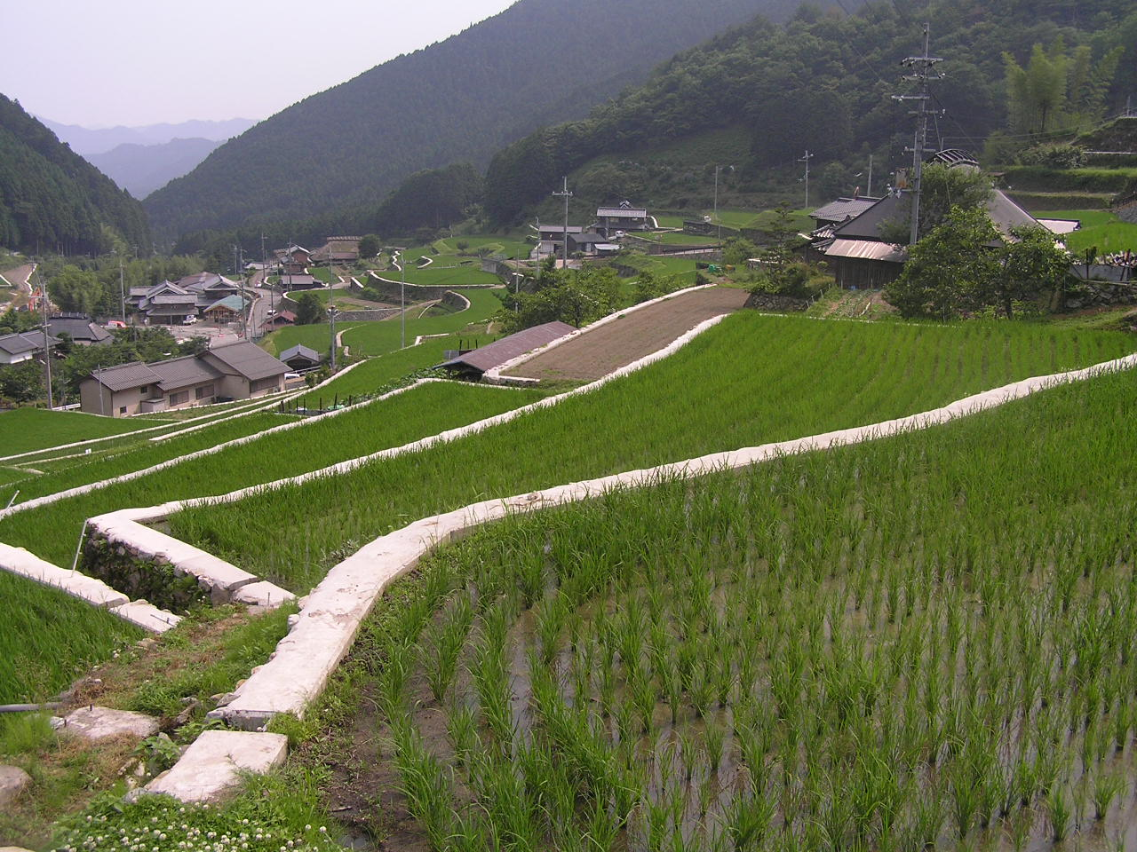 加美町岩座神の棚田